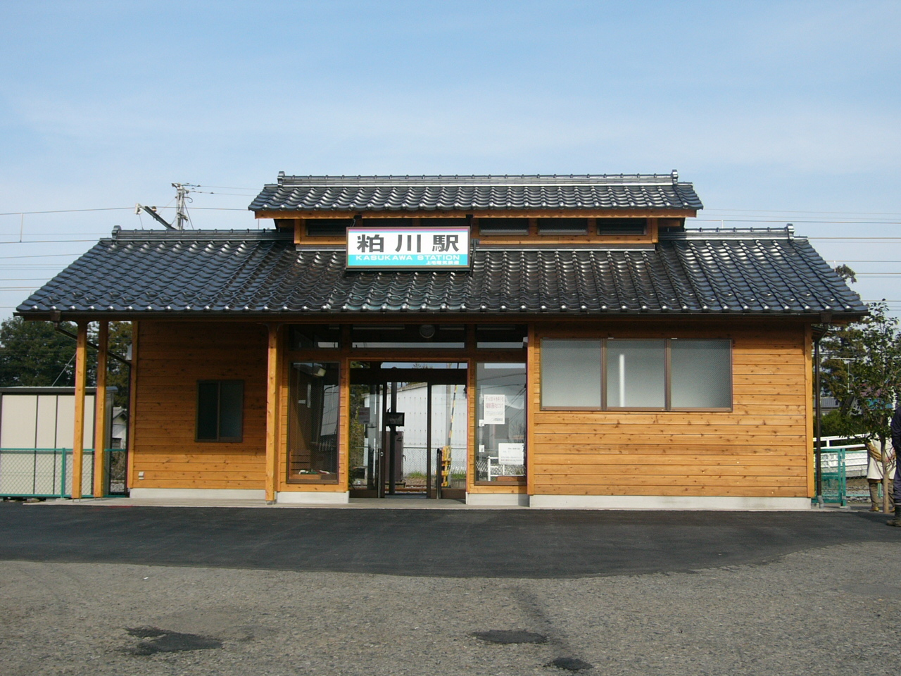 Kasukawa Station